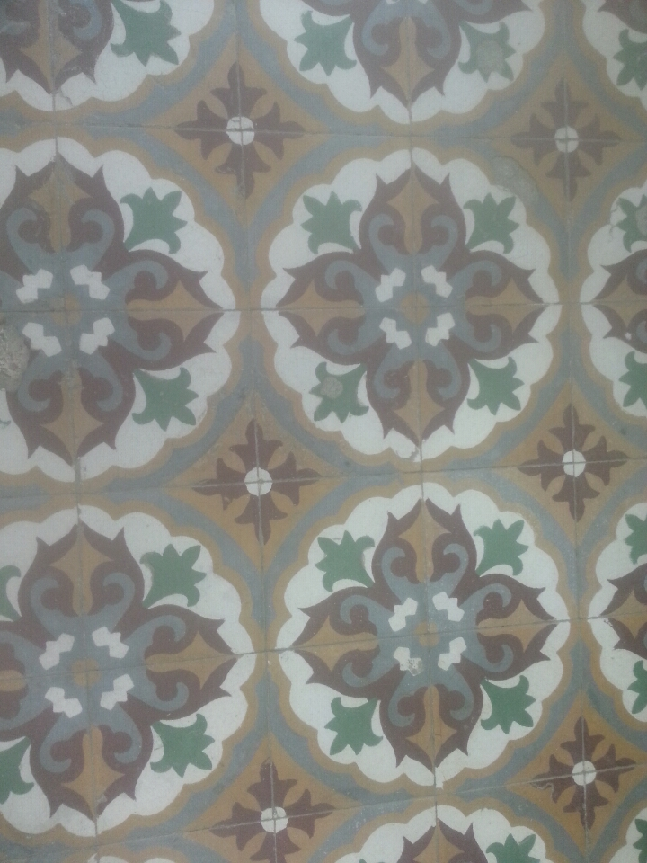 רצפה צבעונית בדגם שטיח מזרחי שהונחה בשנות ה-20 של המאה הקודמת